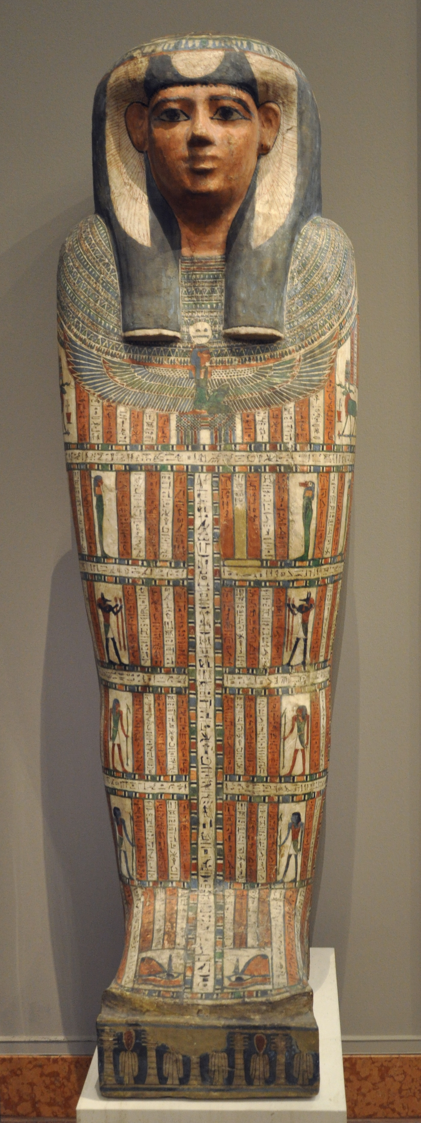 Sarg der Priesterin Iset-en-heb; Ägypten, Theben (?), 25.–26. Dynastie; 7.–6. Jh. v. Chr.; Holz; Liebieghaus, Frankfurt am Main, Inv. Nr. 1653 a–b